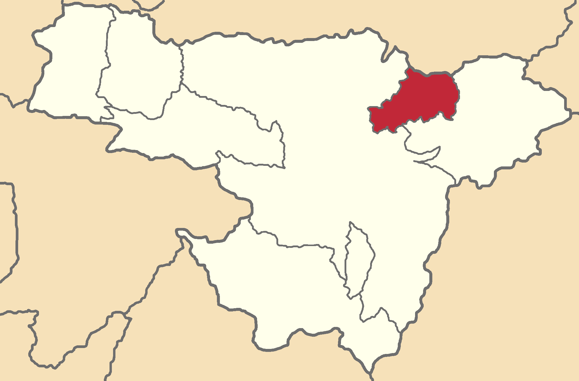 Mapa localizador del cantón en Pichincha, Ecuador